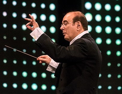 منوچهر صهبایی در اختتامیه سی‌وپنجمین جشنواره بین‌المللی فیلم‌کوتاه تهران